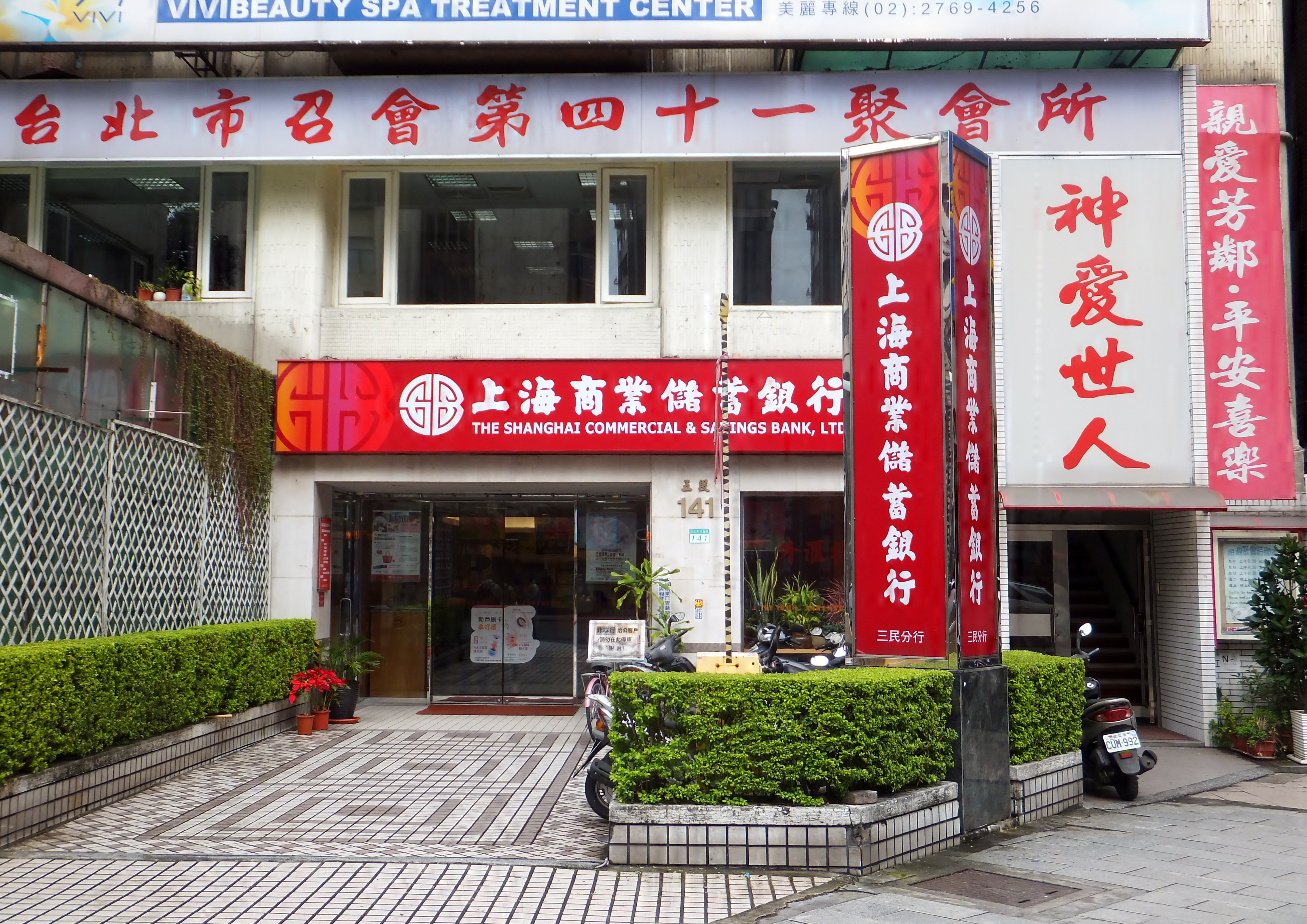 上海商業儲蓄銀行三民分行，二樓是台北市召會第四十一聚會所。地址：臺北市松山區民生東路五段141號。